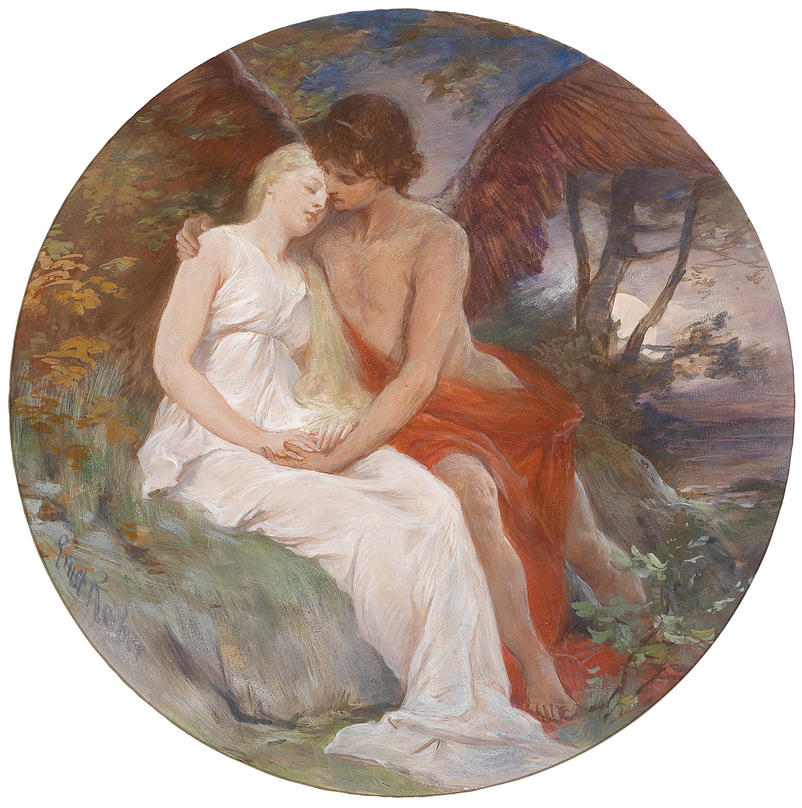 Amor und Psyche, signiert Ernst Roeber, Gouache auf Papier, Durchmesse 28 cm